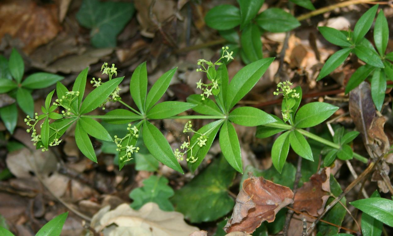 Rubia peregrina, Kaffeegewächse (Rubiaceae) - Türkei/Türkiye/Turkey: Istanbul Prov./İstanbul ili, Belgrader Wald/Belgrad Ormanları NNW Istanbul